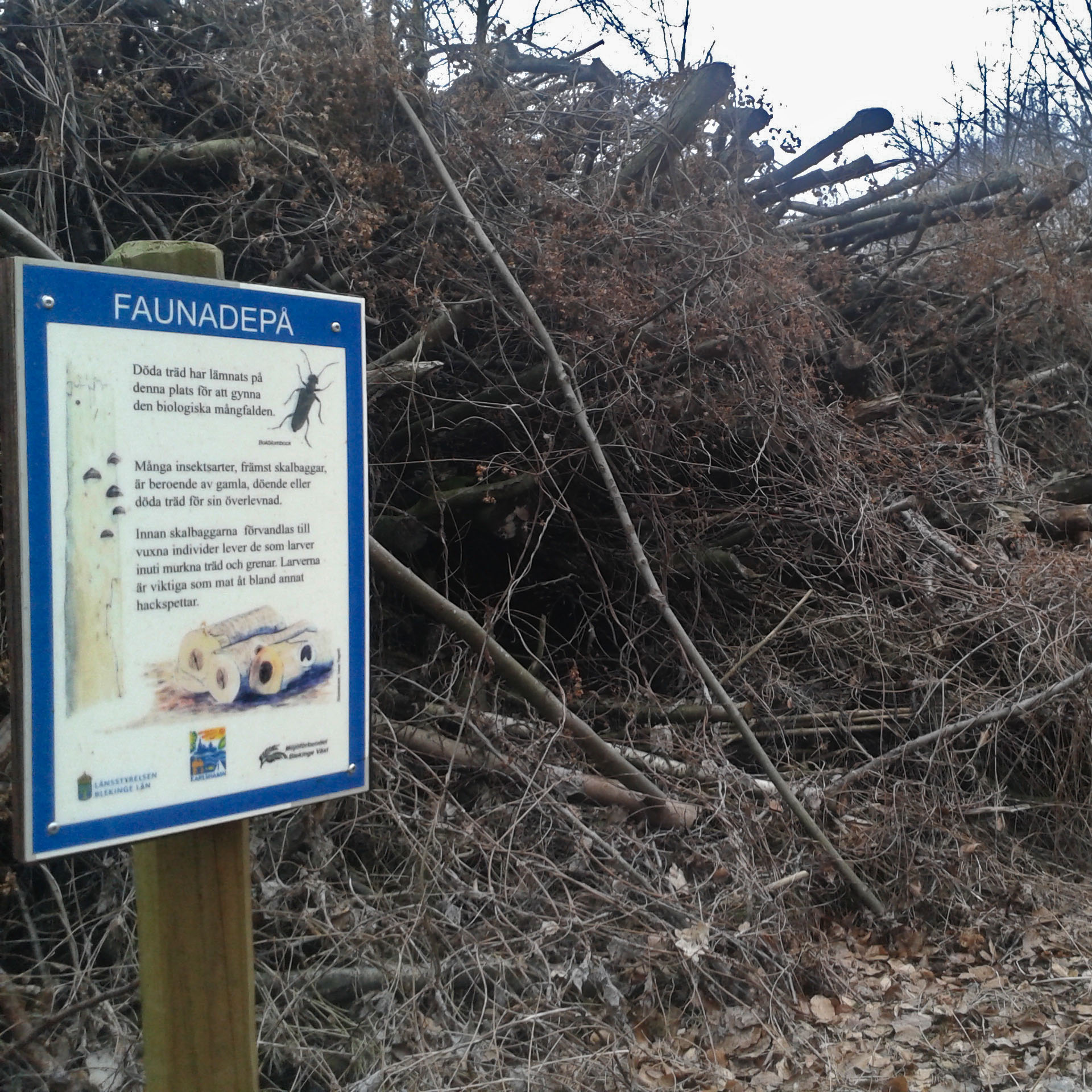 På skylten står: " Döda träd har lämnat på denna plats för att gynna den biologiska mångfalden. {bildtext: Bokblombock} Många insektsarter, främst skalbaggar, är beroende av gamla, döende eller döda träd för sin överlevnad. Innan skalbaggarna förvandlas till vuxna individer lever de som larver inuti murkna träd och grenar. Larverna är viktiga som mat åt bland annat hackspettar. LÄNSSTYRELSEN BLEKINGE LÄN KARLSHAMN Miljöförbundet Blekinge Väst "